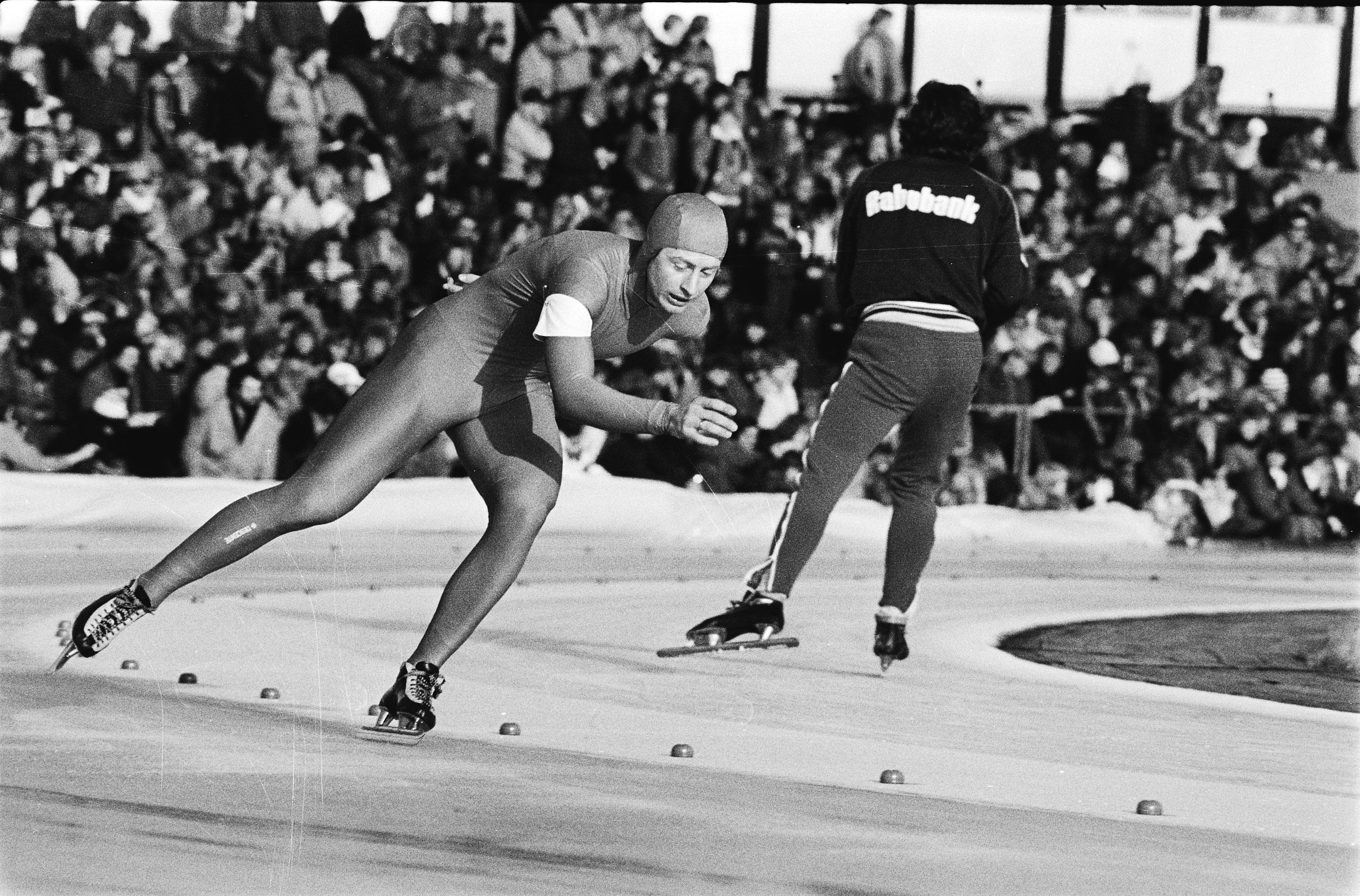 Collectie / Archief : Fotocollectie Anefo Reportage / Serie : [ onbekend ] Beschrijving : Wereldkampioenschappen schaatsen heren allround in Heerenveen. Amund Sjobrend (Noorwegen) in actie. Datum : 1 maart 1980 Locatie : Friesland, Heerenveen Trefwoorden : schaatsen, sport Persoonsnaam : Sjobrend, Amund Fotograaf : Croes, Rob C. / Anefo Auteursrechthebbende : Nationaal Archief Materiaalsoort : Negatief (zwart/wit) Nummer archiefinventaris : bekijk toegang 2.24.01.05 Bestanddeelnummer : 930-6969